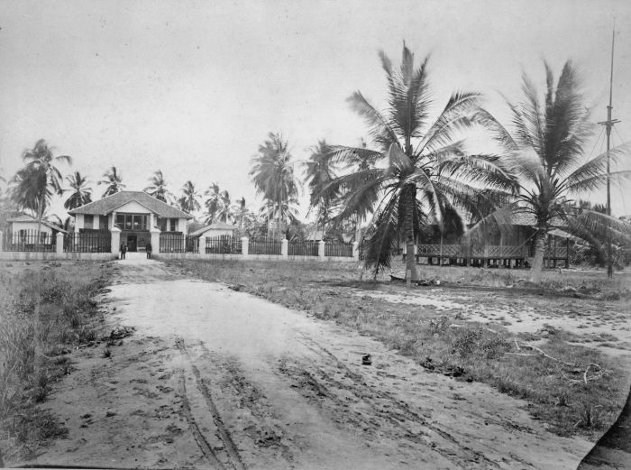 Foto. Oude woning van de sultan van Serdang Rantau Pandjang